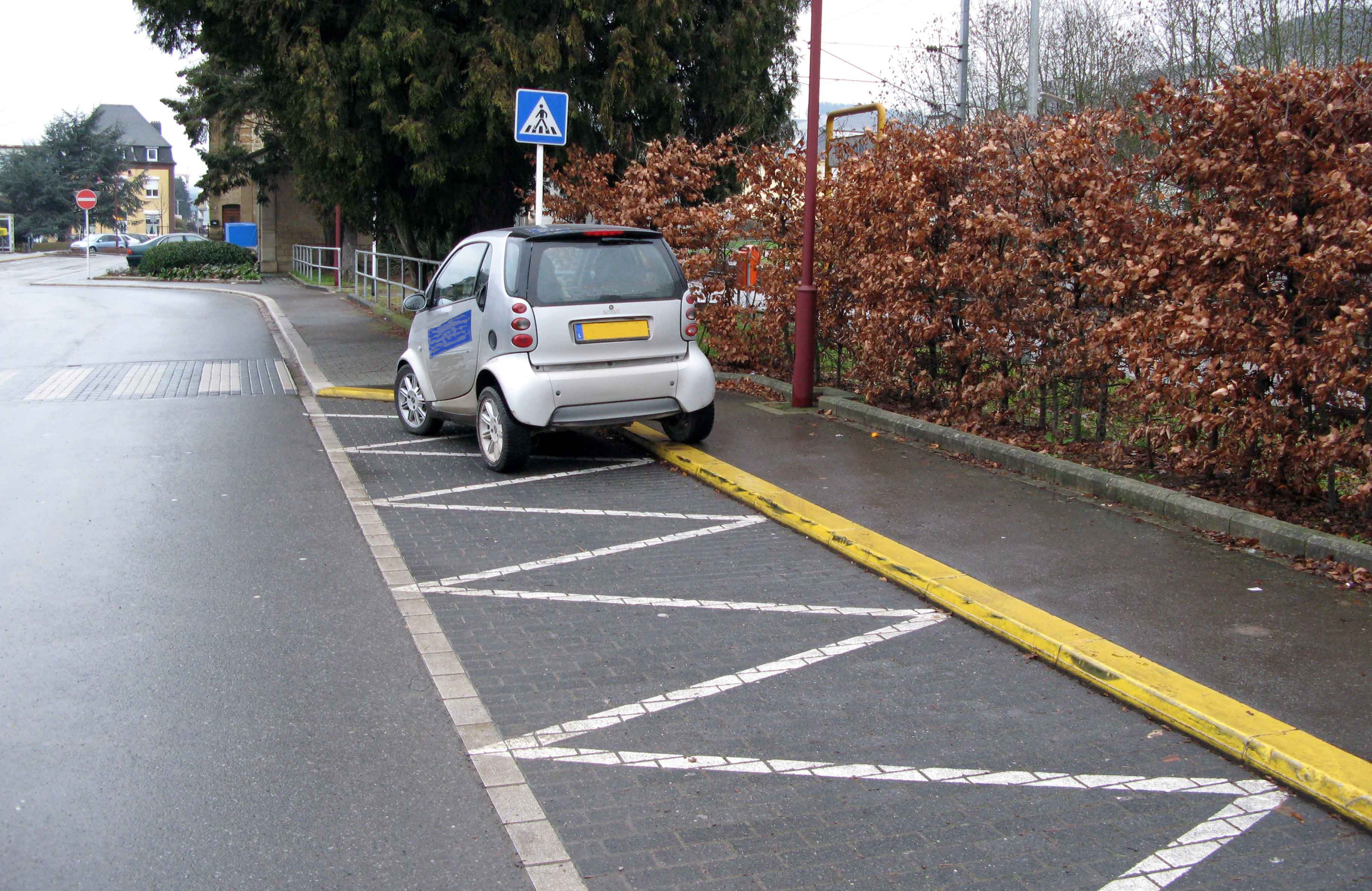 Zickzacklinn.